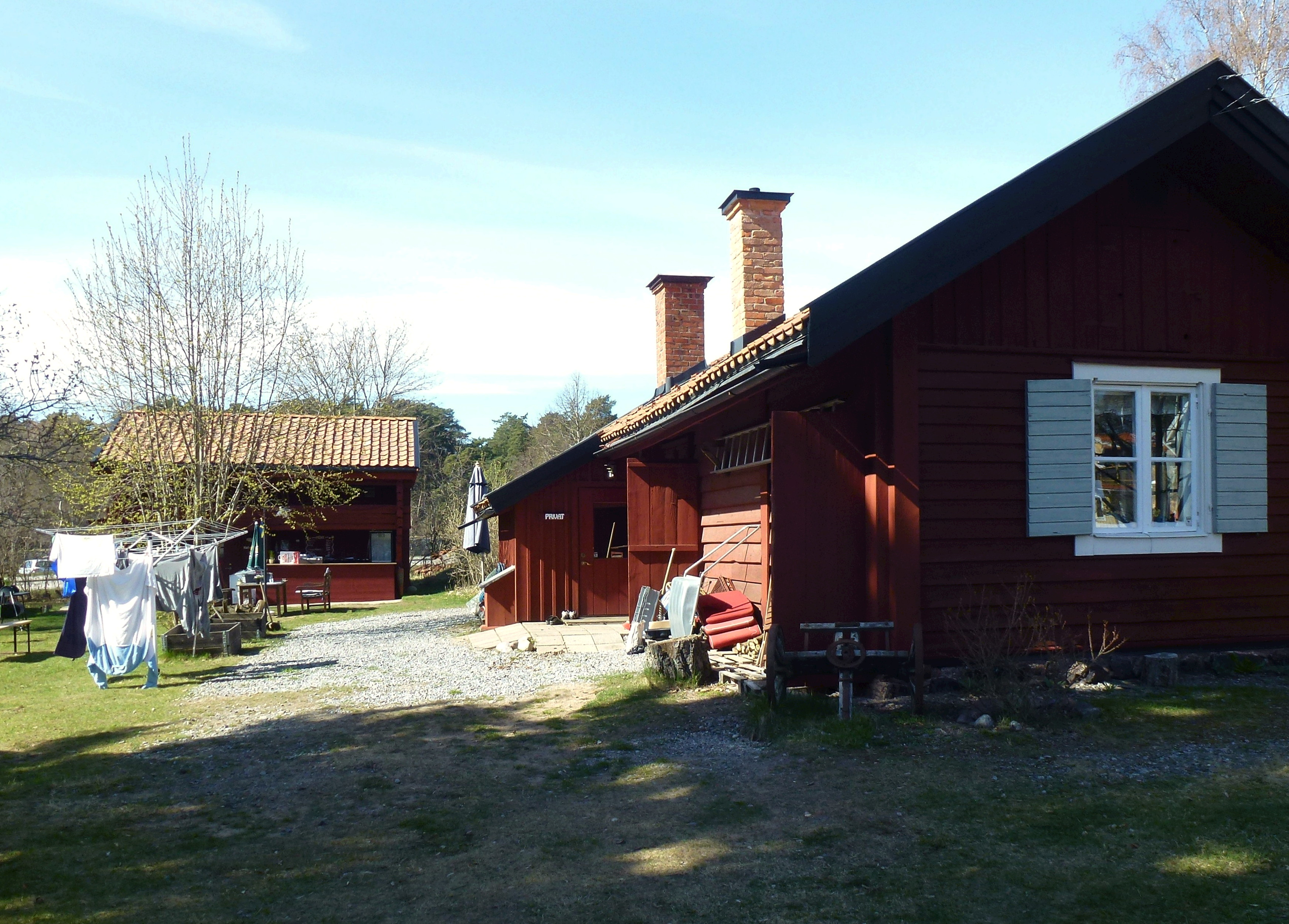 Pungpinetorpet